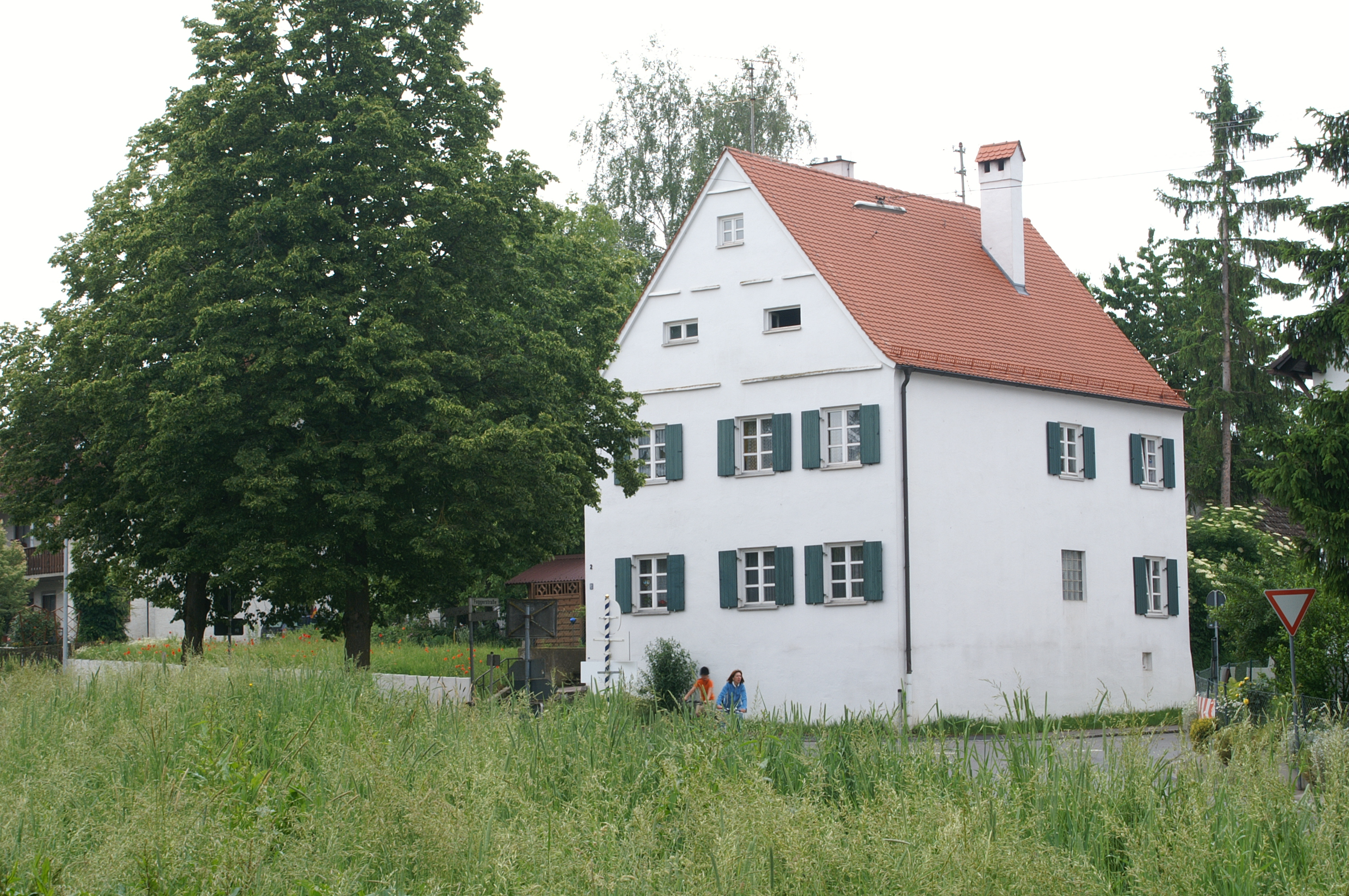 Pfarrhof in Reinhartshausen, Bobingen